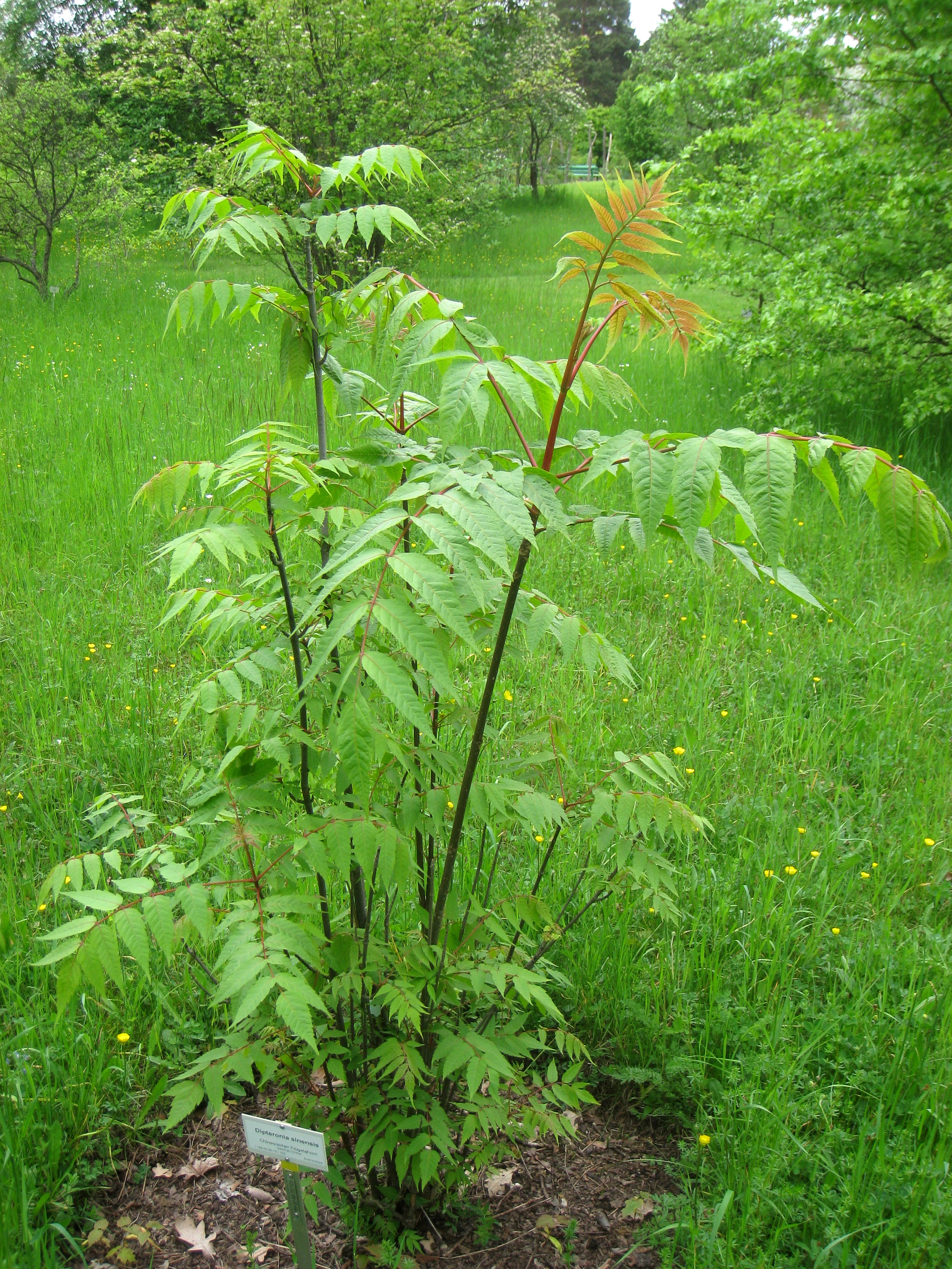 Dipteronia sinensis specimen in the Botanischer Garten, Berlin-Dahlem (Berlin Botanical Garden), Berlin, Germany.